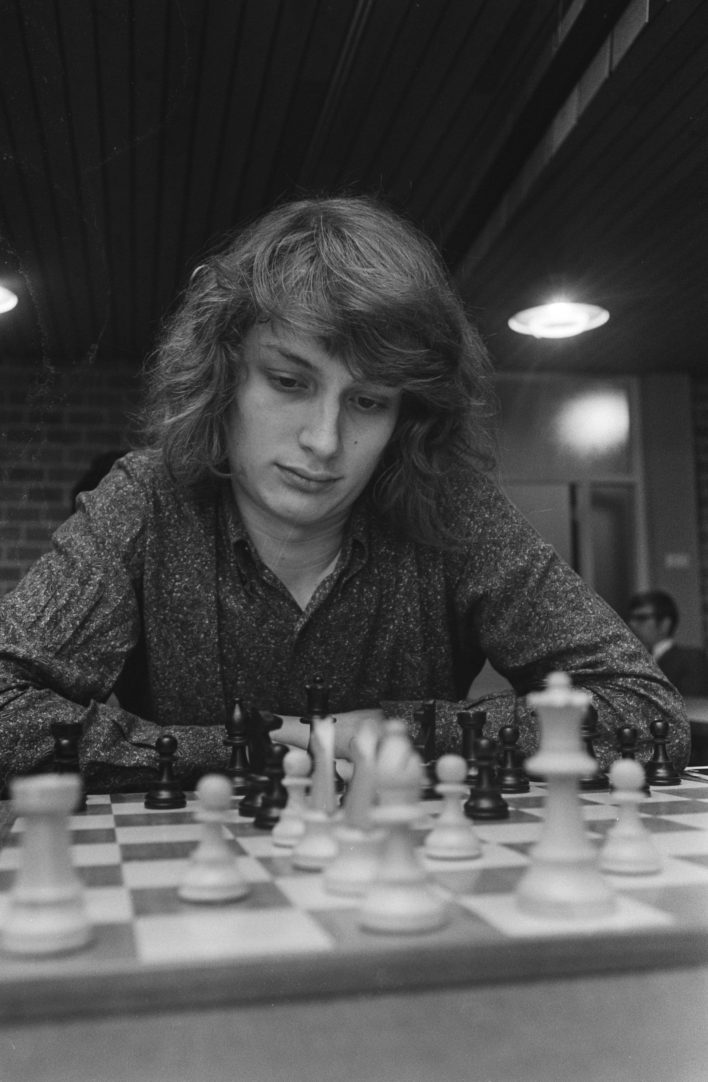 Collectie / Archief : Fotocollectie Anefo Reportage / Serie : [ onbekend ] Beschrijving : Hoogovenschaaktoernooi, Wijk aan Zee ; Timman, kop in aktie Datum : 28 januari 1971 Locatie : Noord-Holland, Wijk aan Zee Trefwoorden : schaken Instellingsnaam : Hoogovenschaaktoernooi Fotograaf : Verhoeff, Bert / Anefo Auteursrechthebbende : Nationaal Archief Materiaalsoort : Negatief (zwart/wit) Nummer archiefinventaris : bekijk toegang 2.24.01.05 Bestanddeelnummer : 924-2167